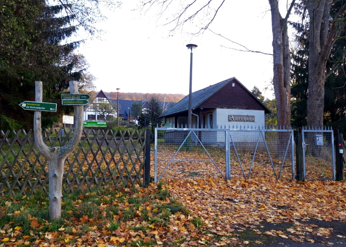 Außenansicht des denkmalgeschützten "Jägerhofs" im Gerstunger Ortsteil Wilhelmsthal.